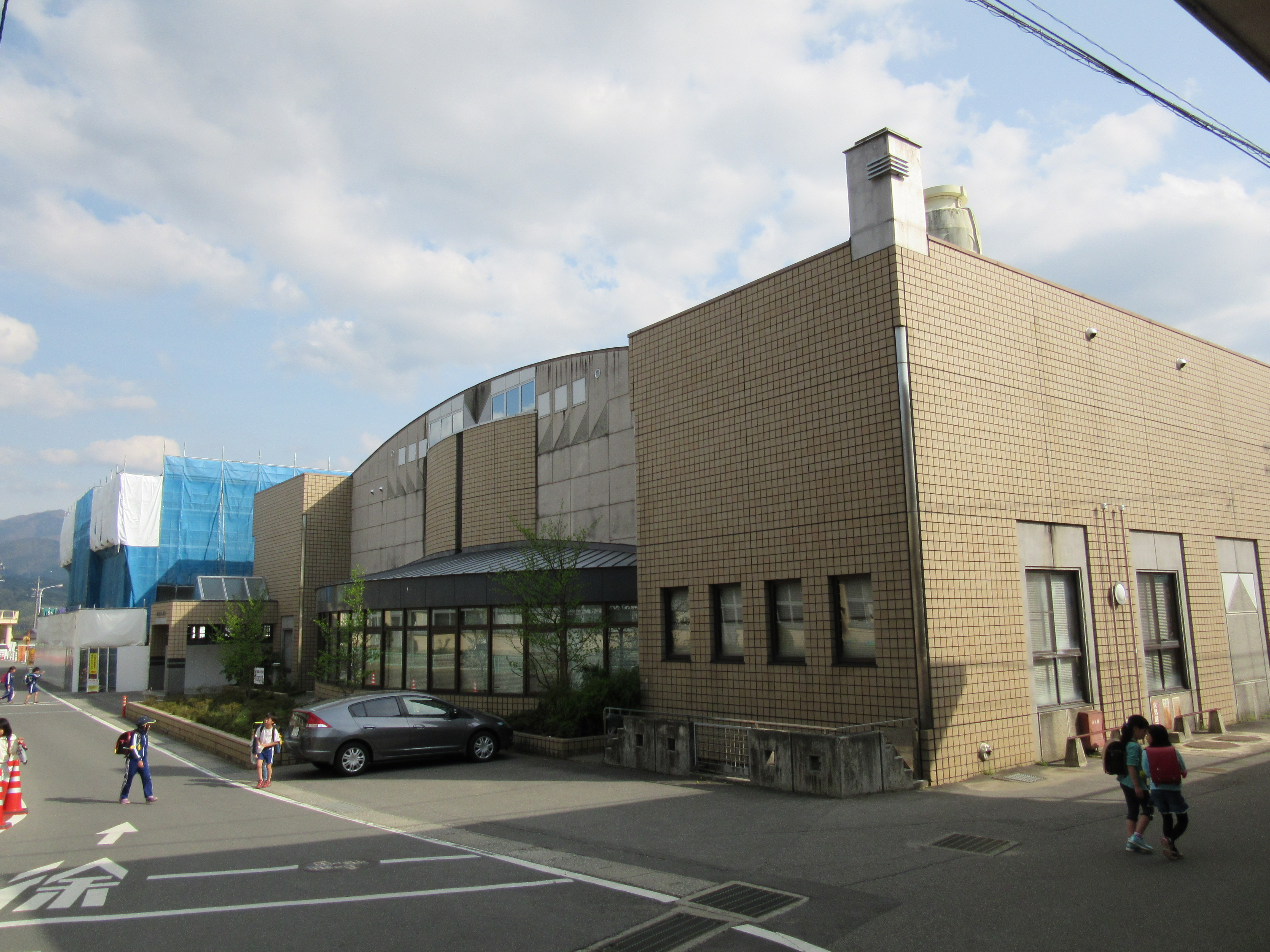 松川町図書館・資料館